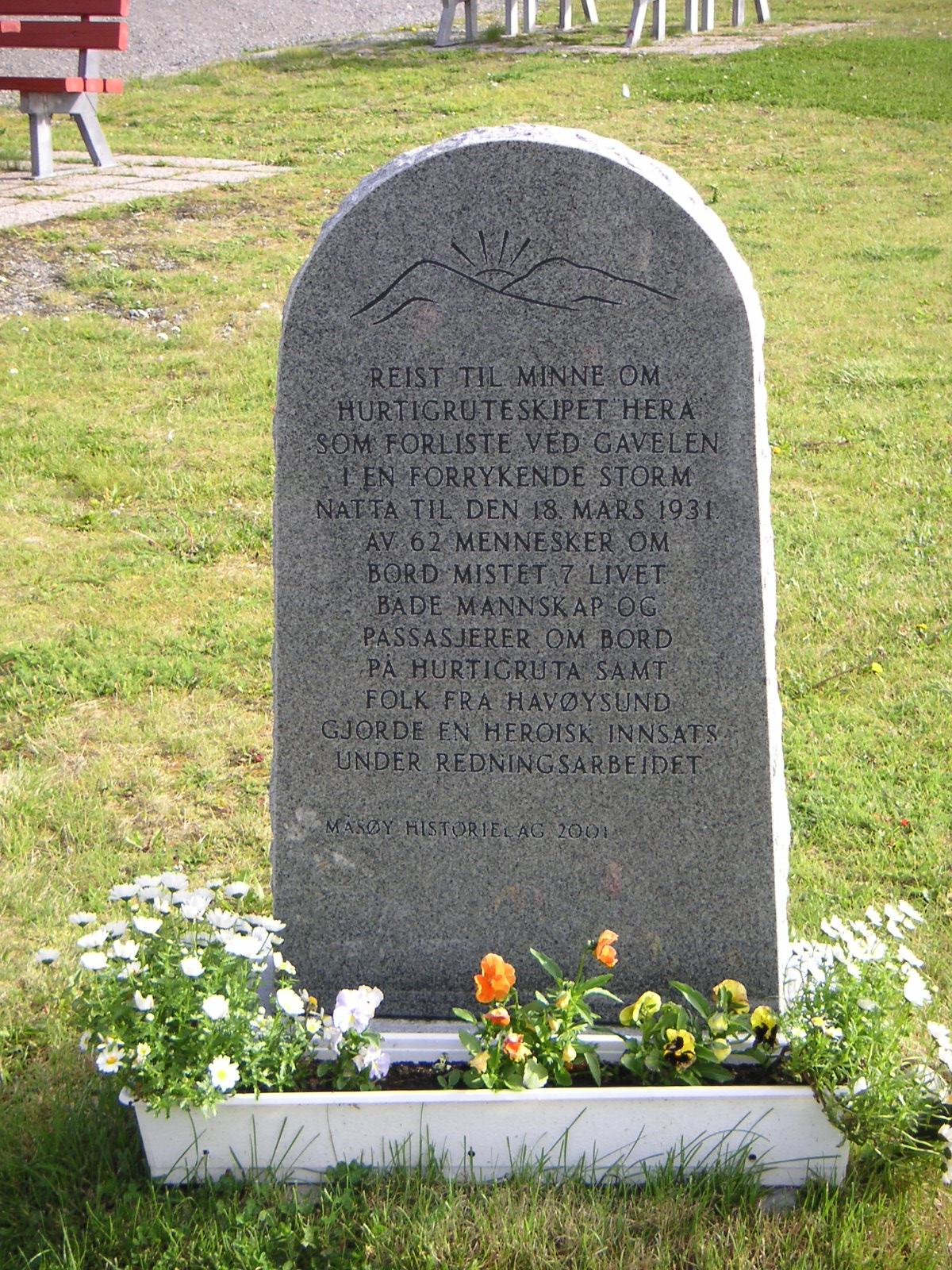 Gedenkstein für die Opfer des Unterganges des Hurtigrutenschiffes "Hera" (18. März 1931) am Anleger von Havøysund